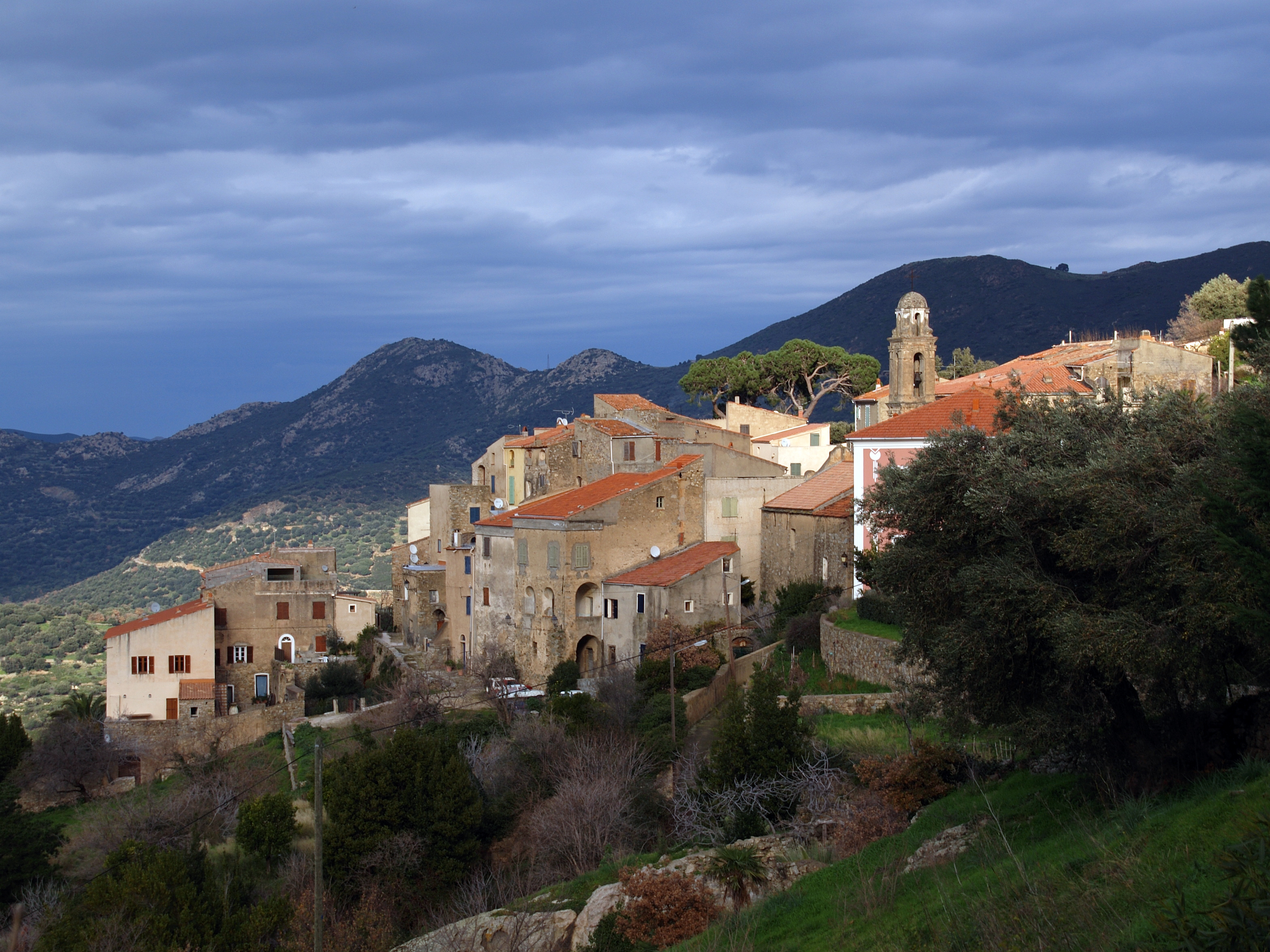 Costa - le village